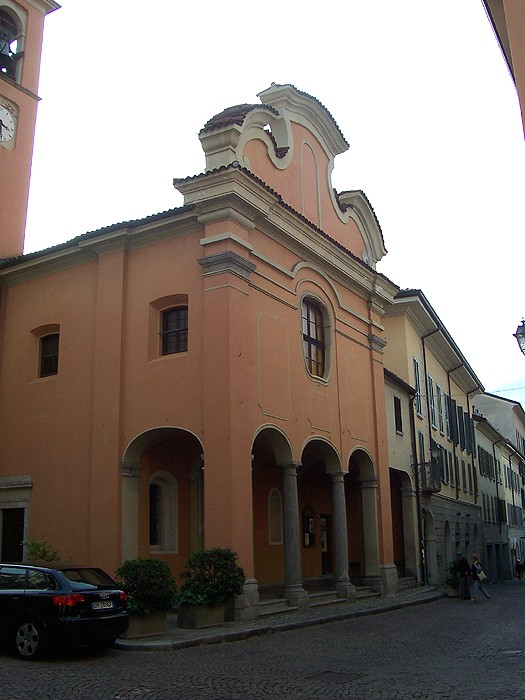 Lecco - Chiesa di S. Marta